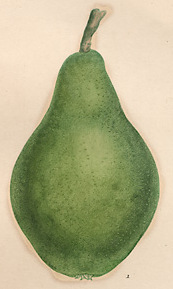 Verte longue d'hiver, poire. Planche de botanique de Jean Henri Jaume Saint-Hilaire (1772-1845).